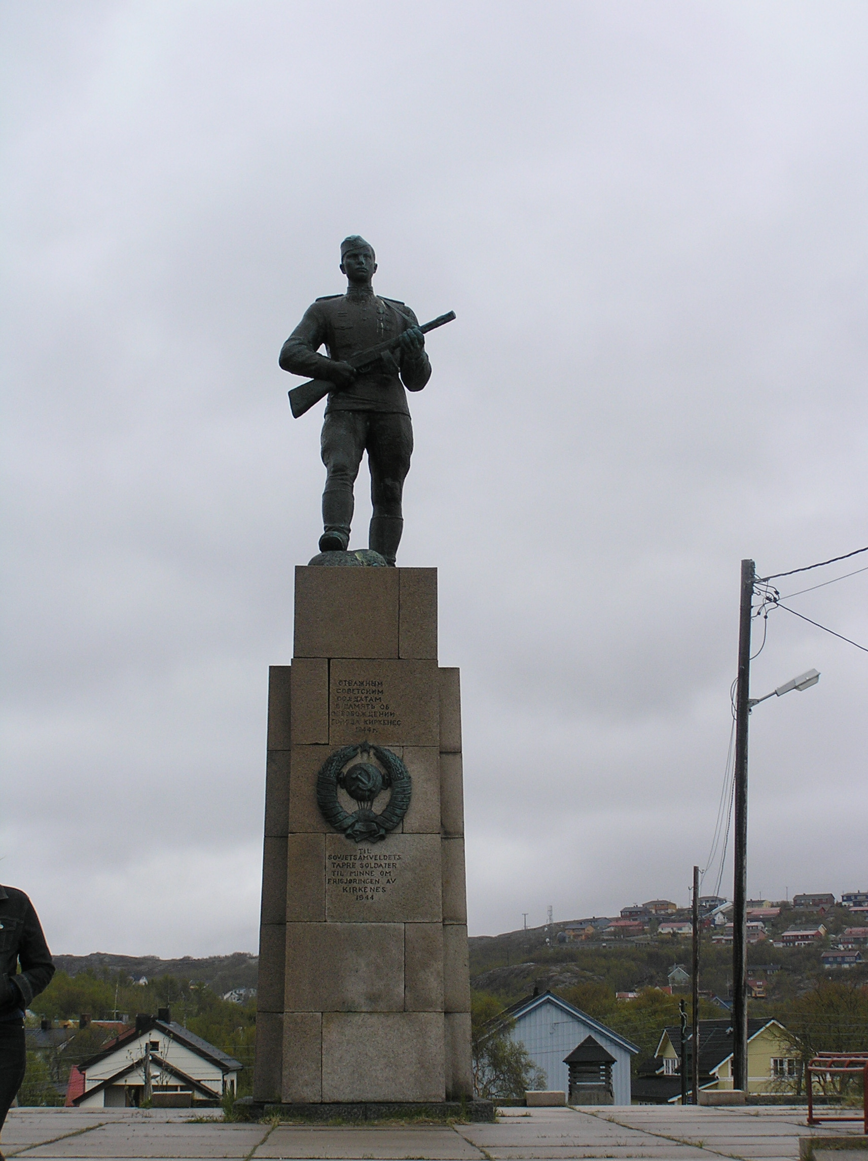 Памятник солдатам Красной армии на площади Руаля Амундсена (Киркенес)